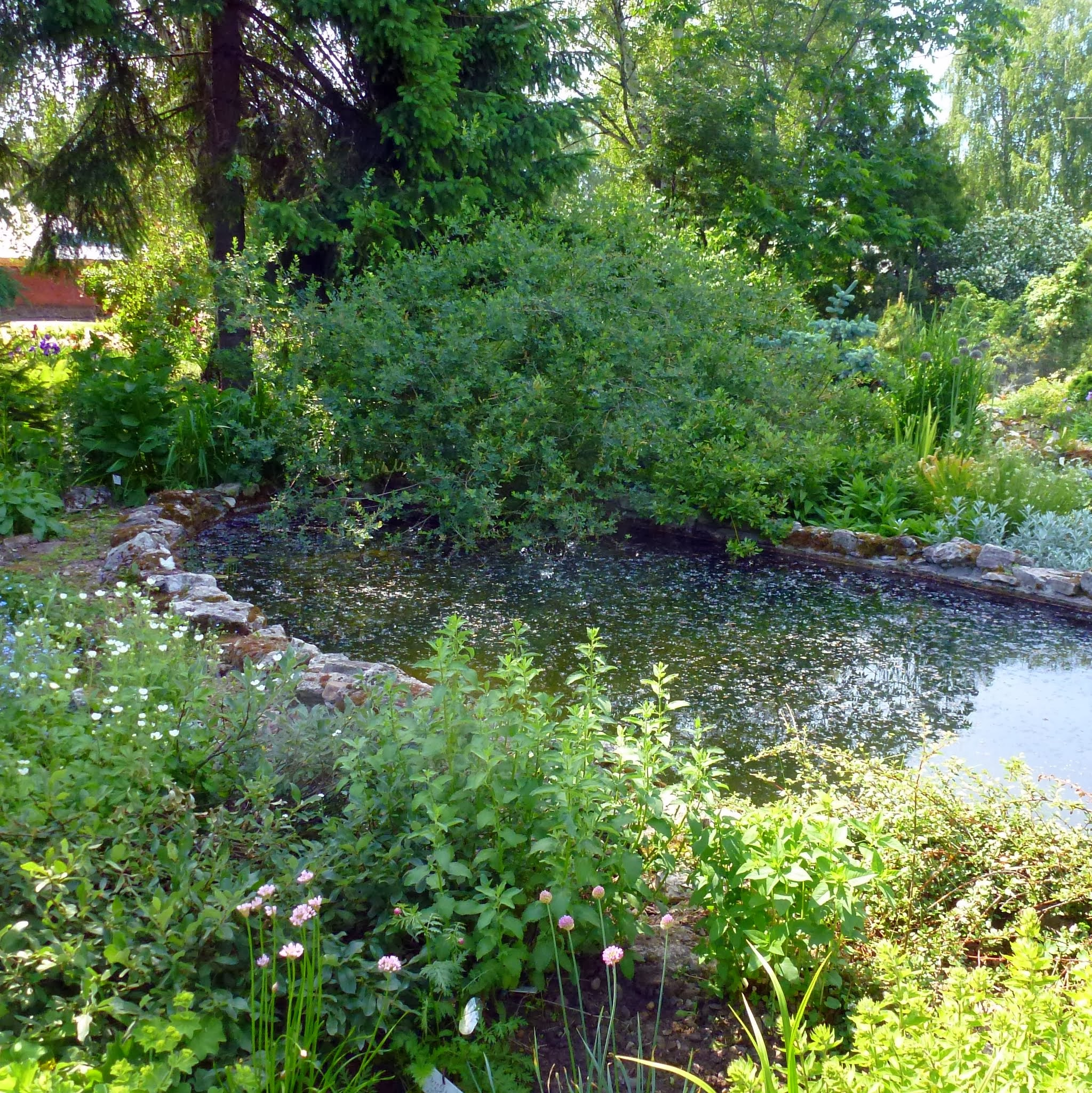 Пермский государственный национальный исследовательский университет. Ботанический сад им. Генкеля